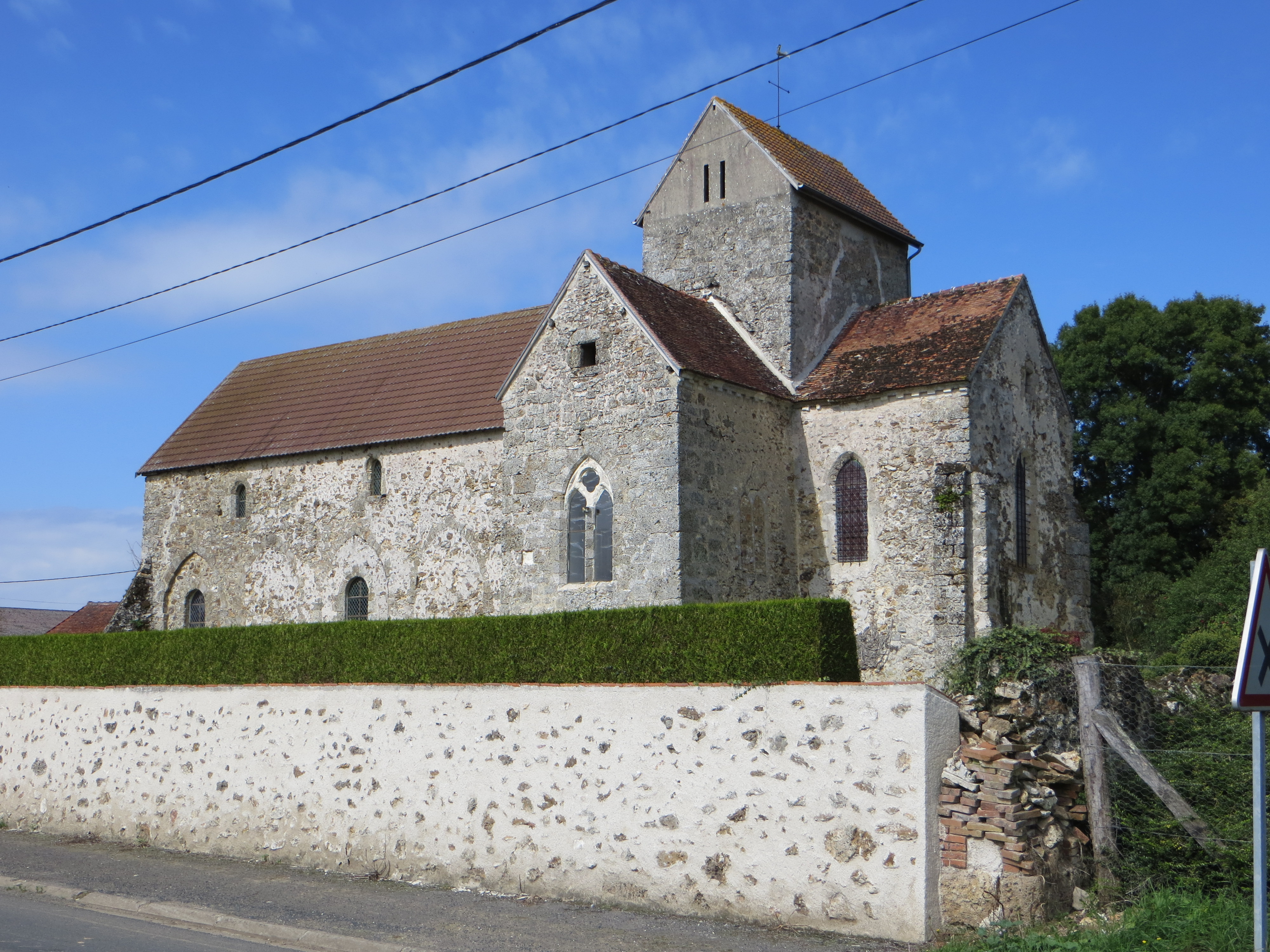 Vue générale de l'église